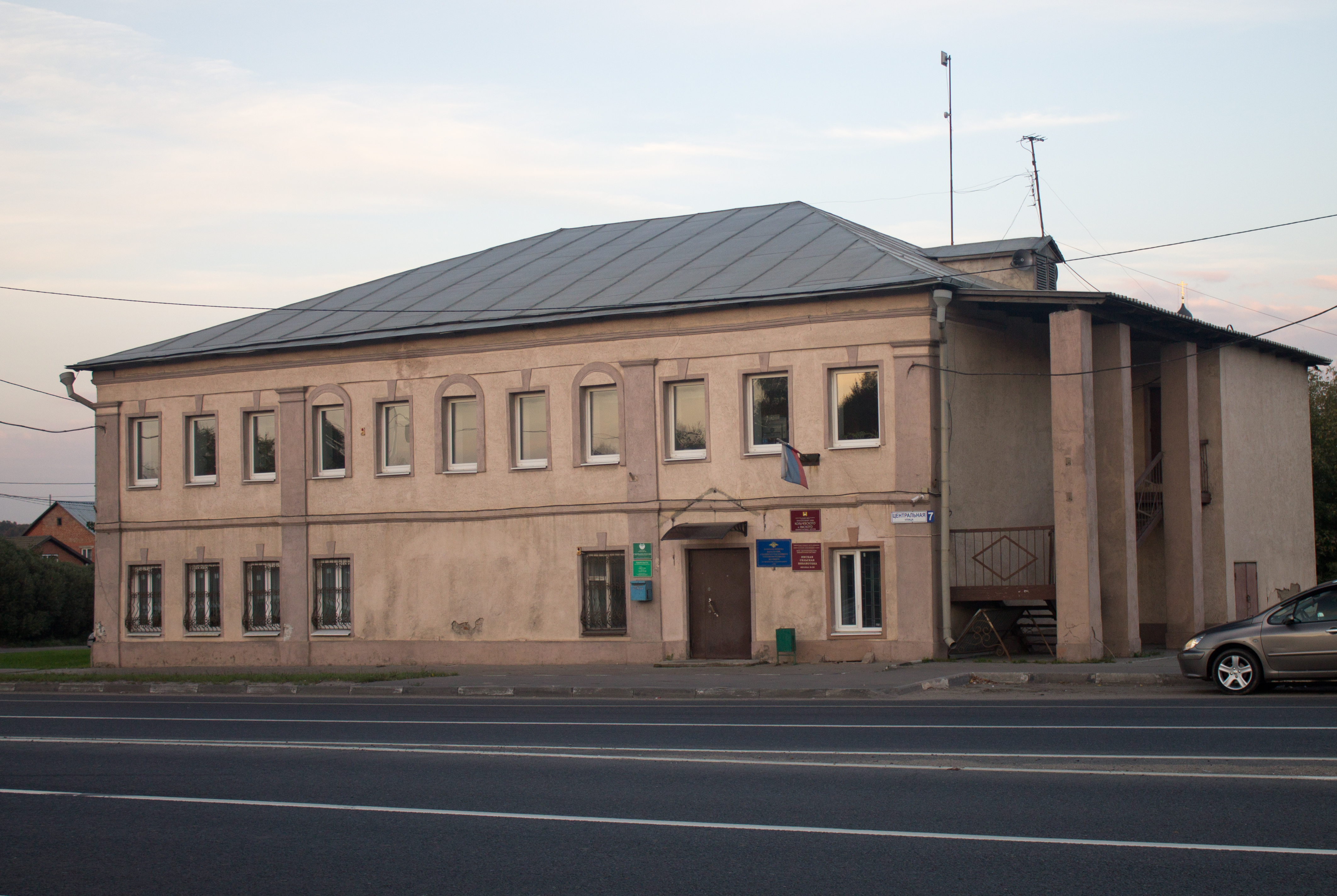 Ансамбль почтовой станции: Ям (Старый Ям), Домодедовский городской округ, Московская область